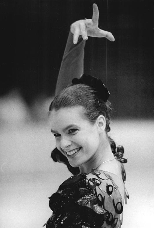 Katarina Witt ADN-ZB Thieme 5.1.1988-mm-Karl-Marx-Stadt: Vorschaumotiv zu den Europameisterschaften im Eiskunstlaufen vom 11. bis 17. Januar 1988 in Prag.- Die 22-jährige achtfache DDR-Meisterin, Olympiasiegerin und Weltmeisterin Katarina Witt (SC Karl-Marx-Stadt), hofft als Titelverteidigerin ihren sechsten EM-Erfolg in Reihenfolge zu erringen. Mit ihrer neuen Kür als "Carmen" stellte sie sich bei den DDR-Meisterschaften (Foto) im Dezember in Karl-Marx-Stadt vor.